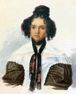 Акварель Н.А.Бестужева. 1837